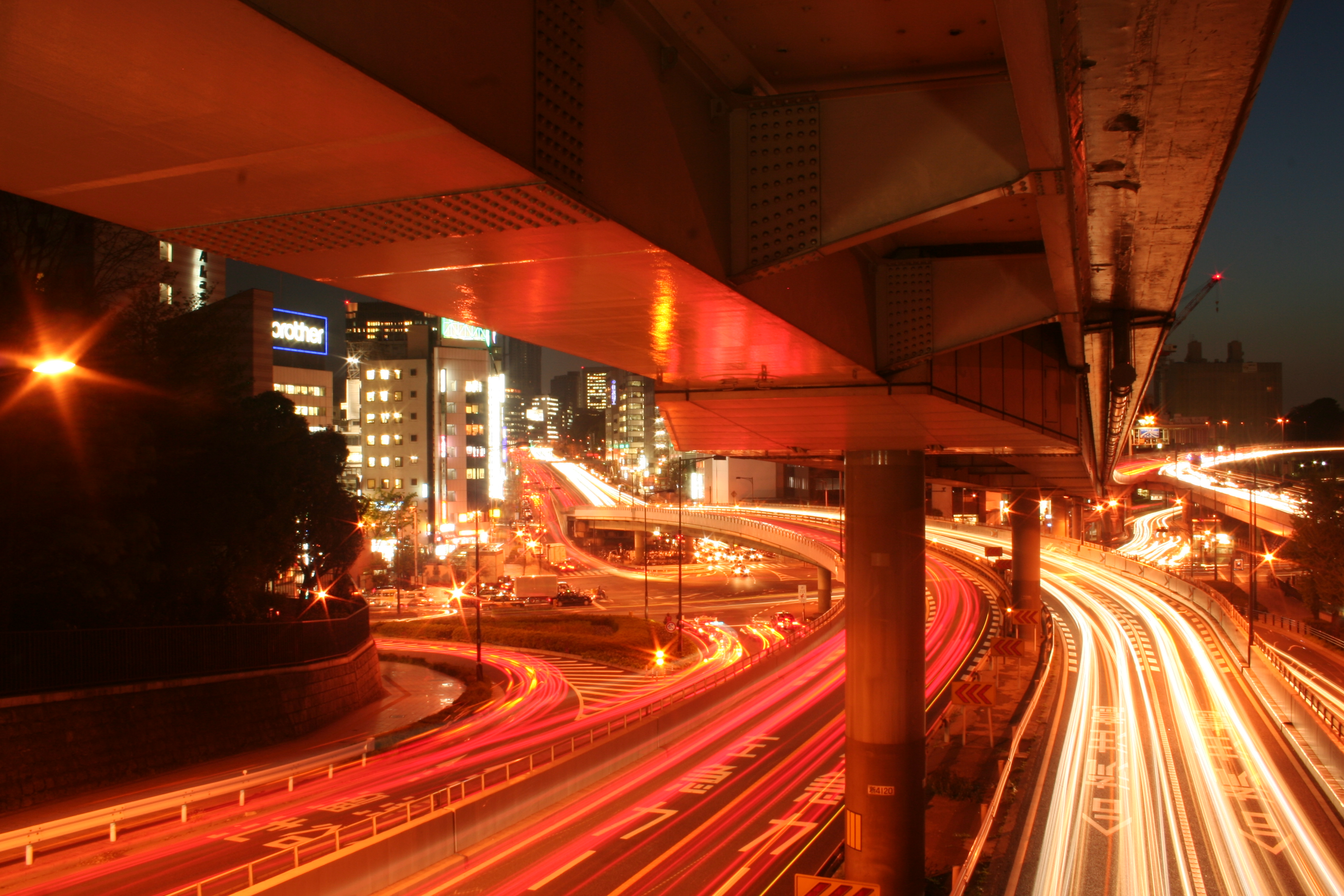 Streets near Akasaka-Mitsuke in Tokyo, Japan